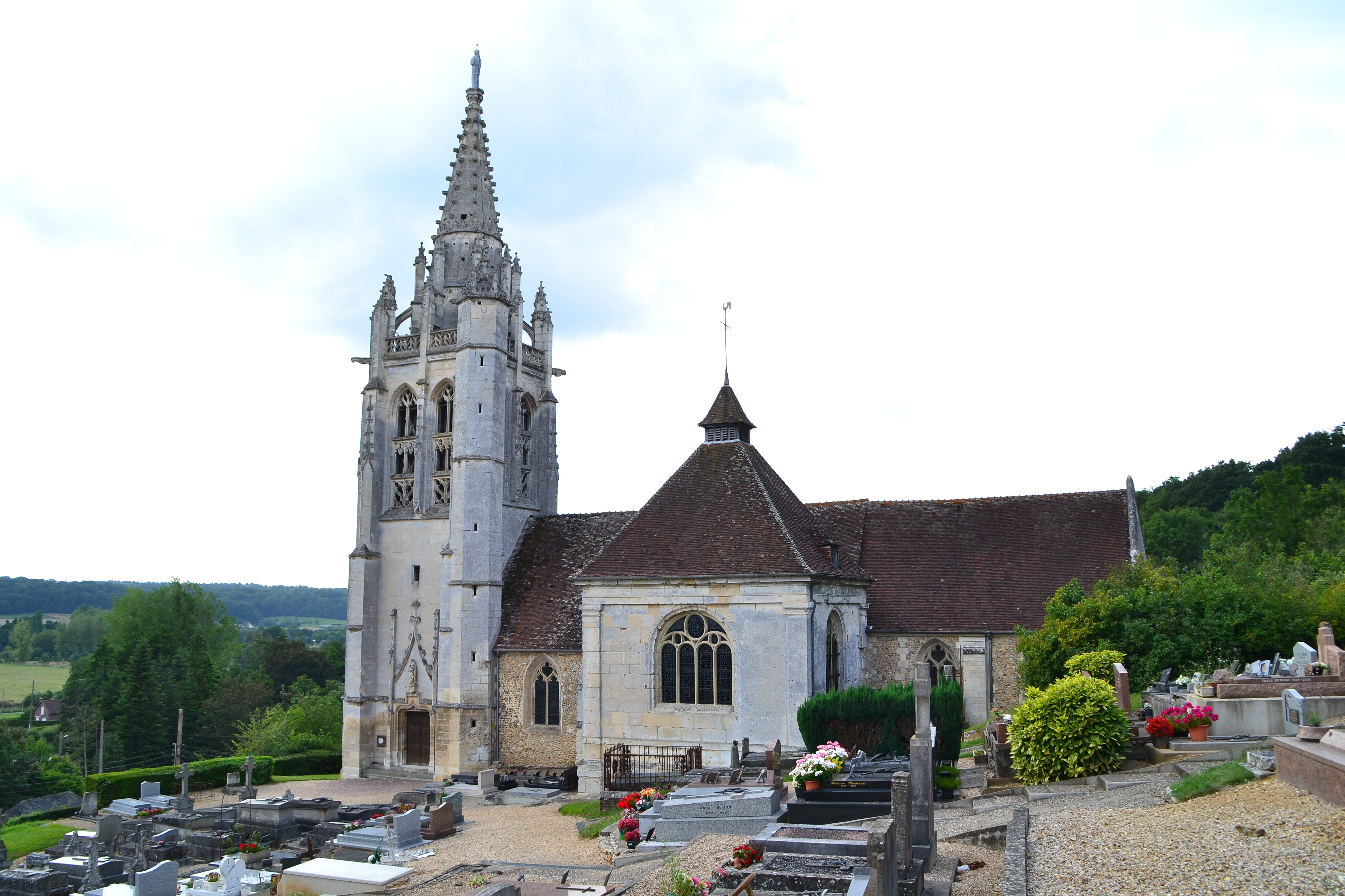 Église Saint-Pierre de Beaumontel